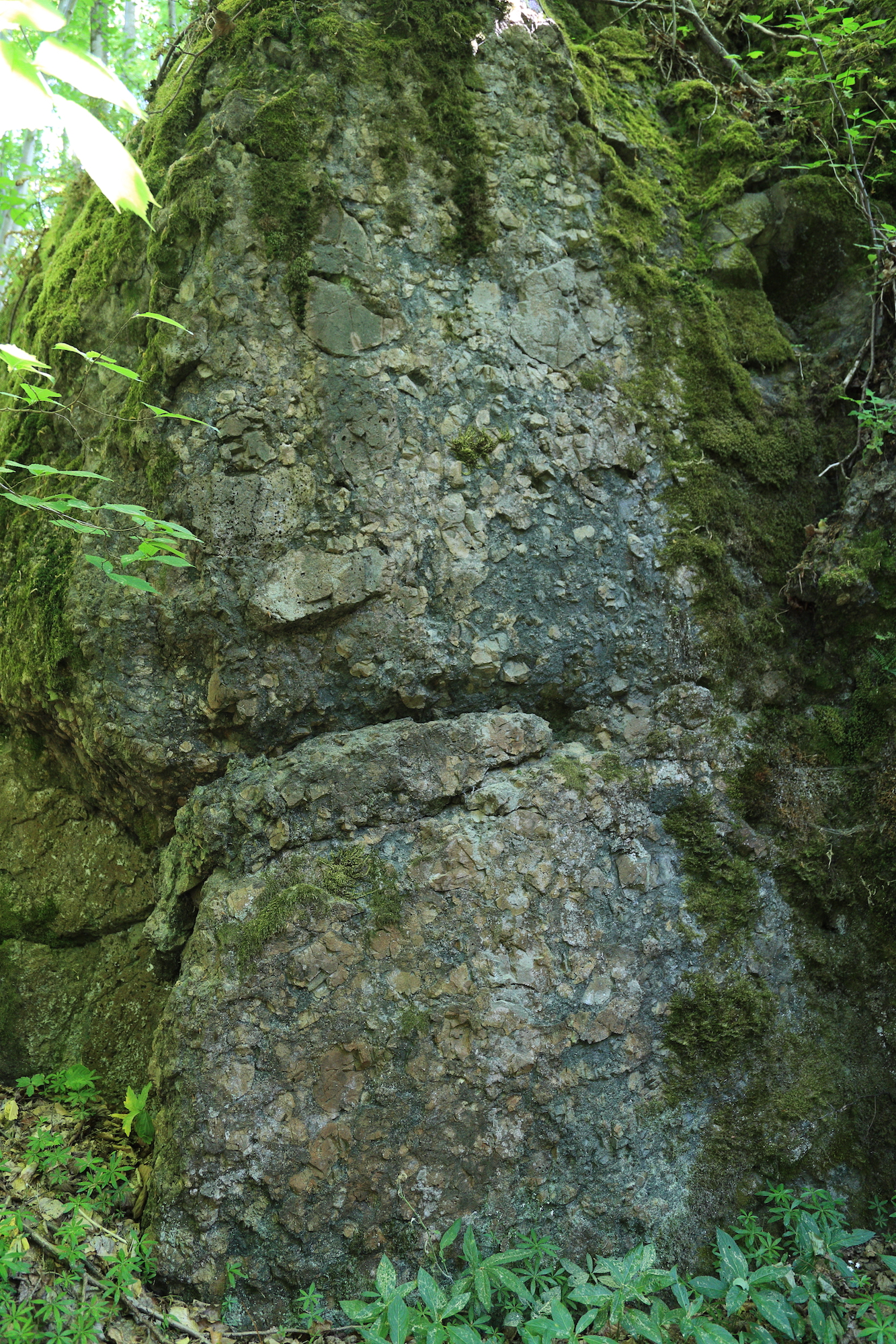 GeotopNr.: 475r003/Landkreis Hof/Geroldsgrüner Forst/Frankenwald